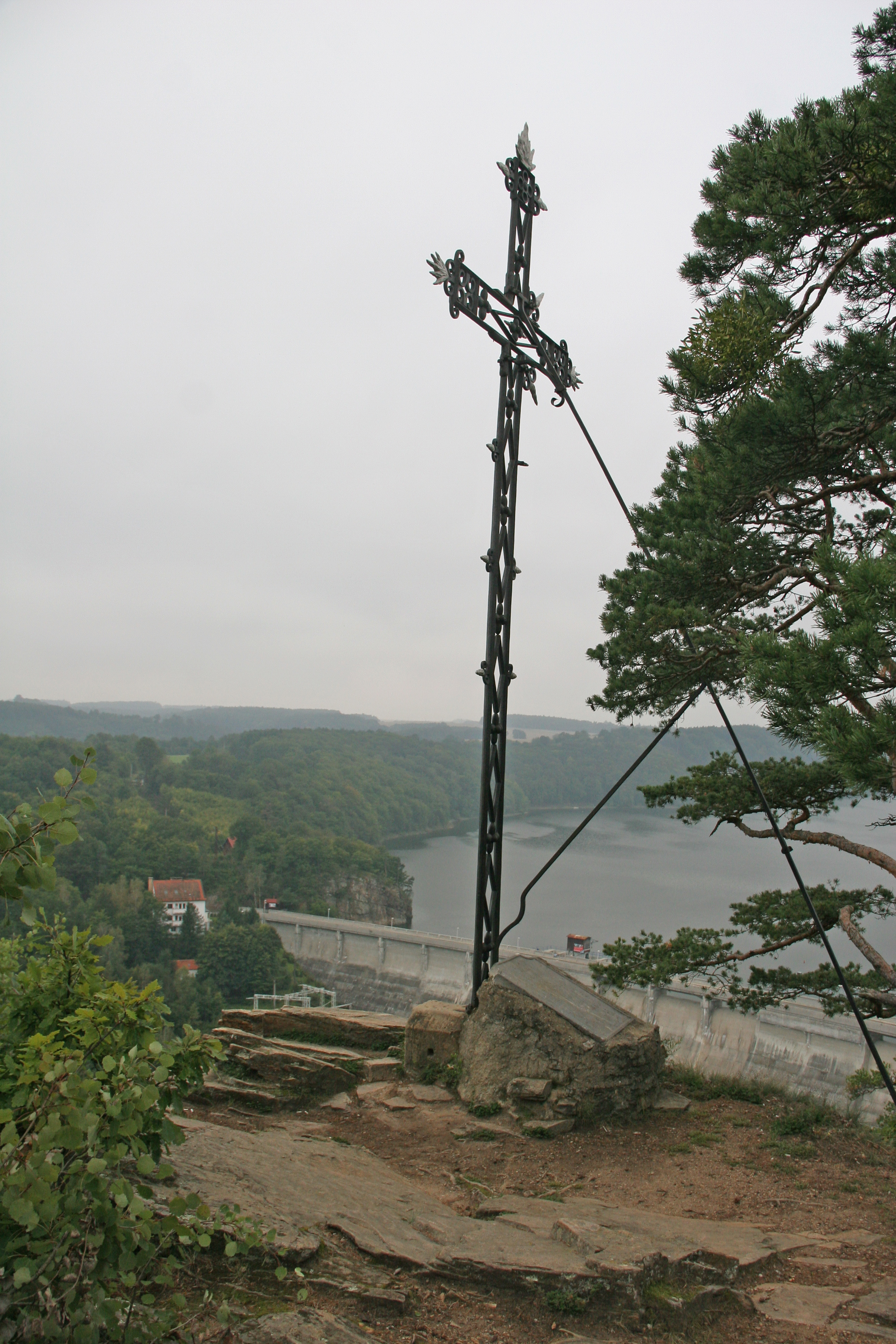 Kříž, na skále, nad hrází přehrady, Onšov (okres Znojmo).